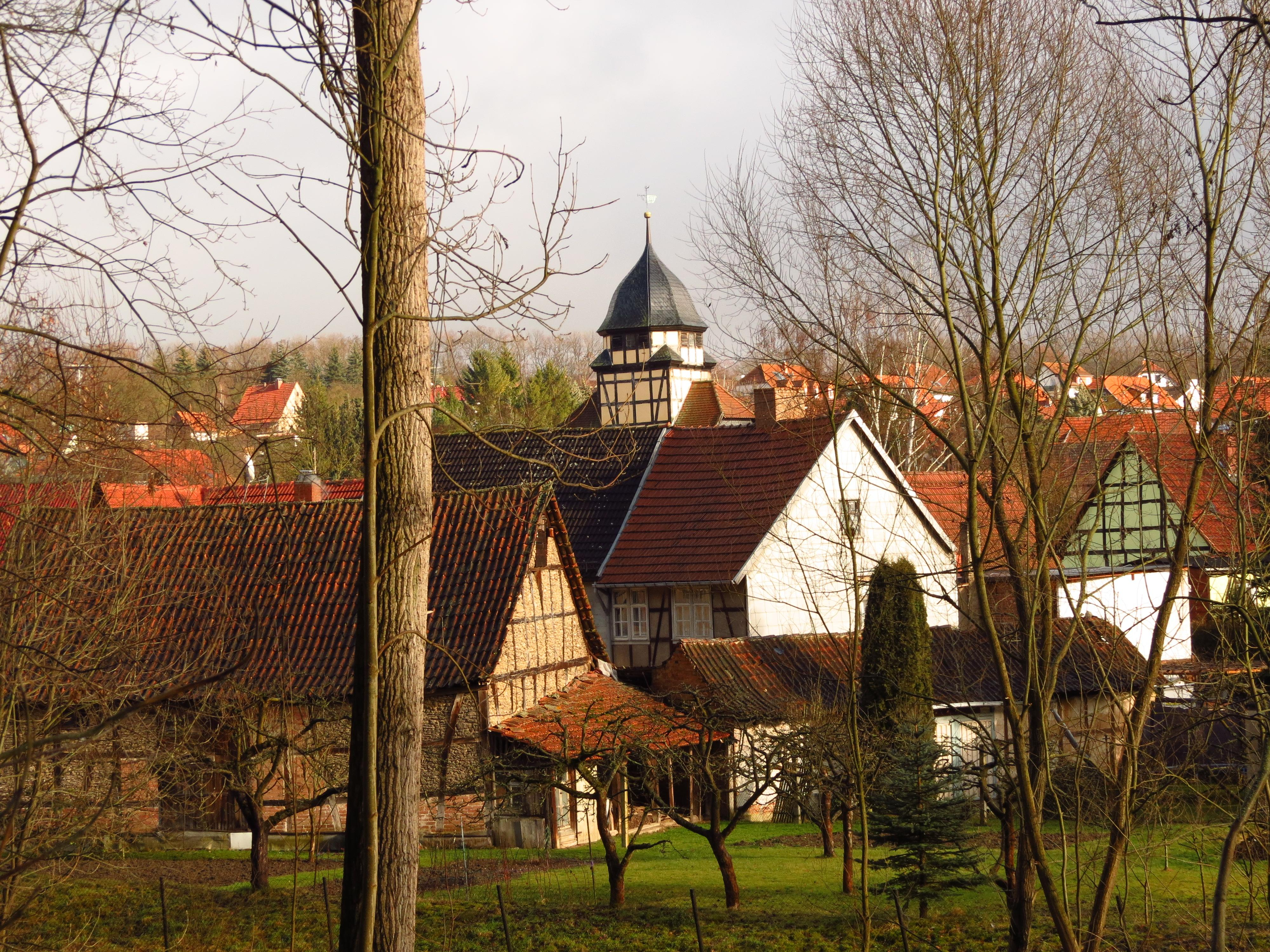 Blick auf Reiser von Südwesten her.